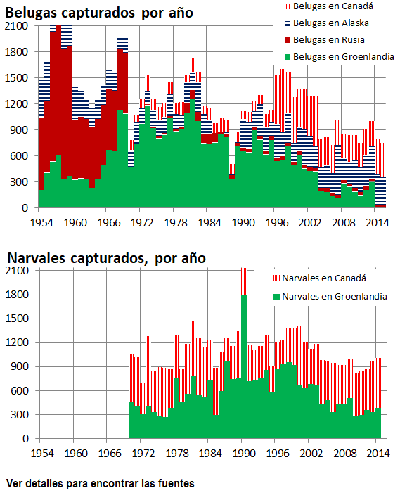 Belugas y narvales capturados por humanos. Narvales Belugas: Mar de Beaufort: 1960-1984 1970-99 2013-15 2000-2012 Arviat Nunavik: 1996-2002 2003-16 Rusia: 1954-1985 cita documentos Rusos, NMFS, cita un documento Ruso Groenlandia: 1954-2016, M.P. Heide-Jorgensen et E. Garde, 2017-03-01 "Catch statistics for belugas in Greenland 1862 to 2016", NAMMCO/JCNB Joint Working Group on narwhals and belugas, Copenhagen Alaska: 1954-1984 con citas anteriores 1987-90 ensenada de Cook 1990-2011 2012-2015 + ensenada de Cook [1]